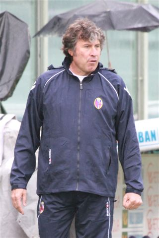 Alberto Malesani, mister del Bologna.